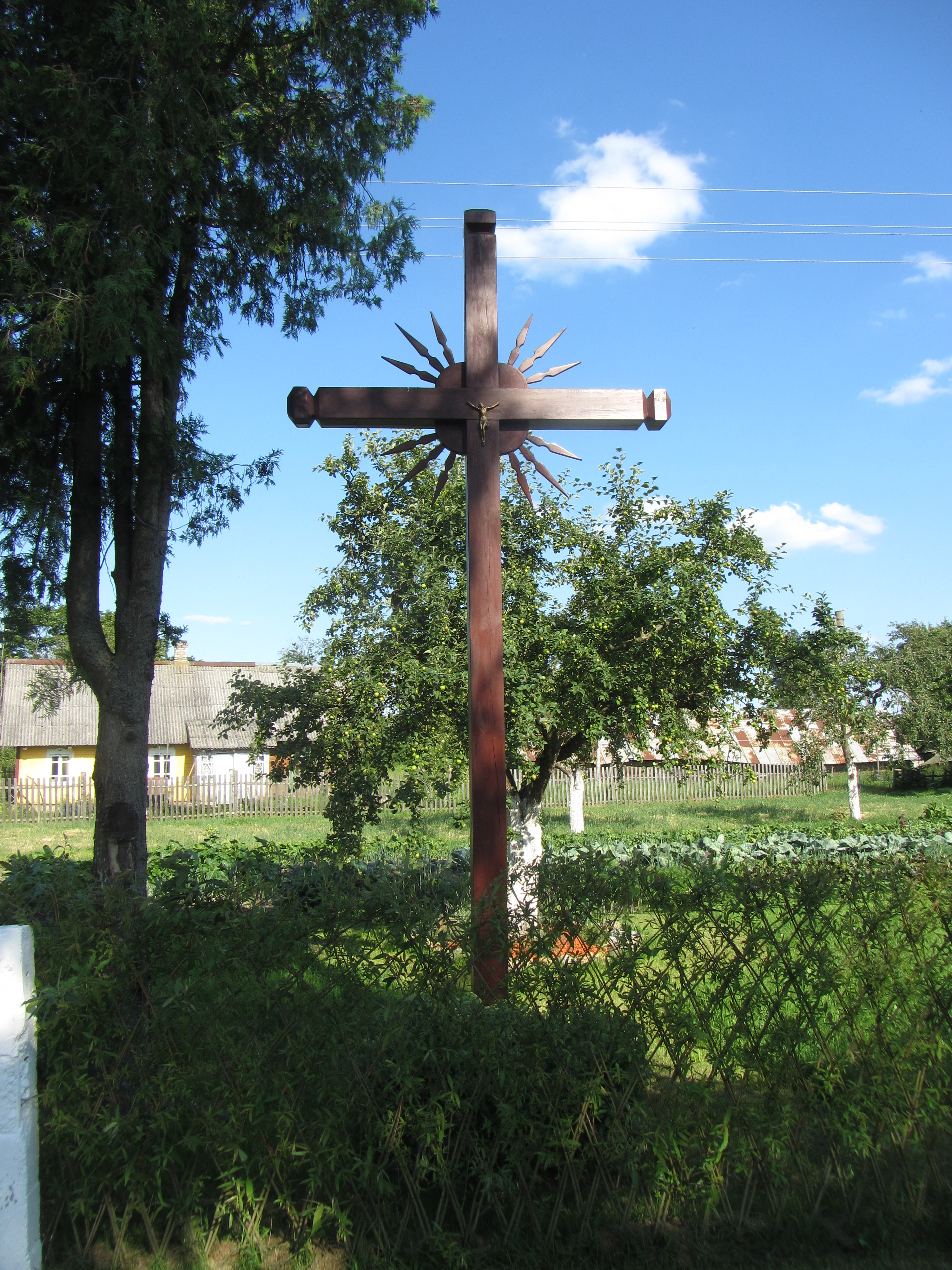 Daržininkai 65244, Lithuania